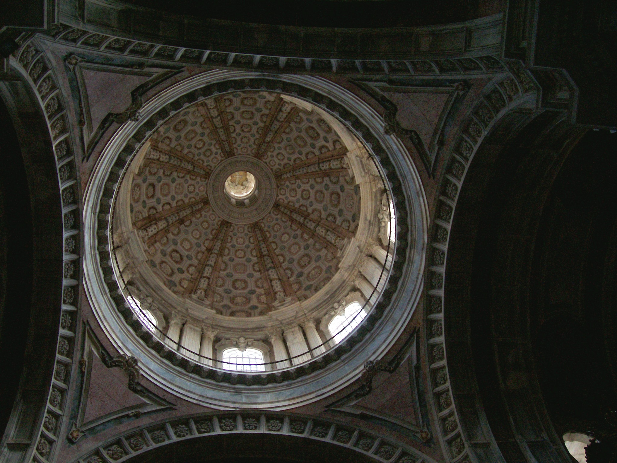 Esta foto participa en el juego En un lugar de flickr... . El Palacio Nacional de Mafra es un monumento barroco localizado en la ciudad portuguesa de Mafra. El palacio también sirvió de convento franciscano. El Palacio Nacional de Mafra fue construido por el rey Juan V de Portugal como consecuencia de la promesa realizada a su mujer, la archiduquesa María Ana de Austria, en que se comprometía a construir un monasterio si le daba descendientes. El nacimiento de la princesa Bárbara de Braganza, después mujer del rey Fernando VI de España, hizo que el rey iniciara las obras. Los edificios de Mafra se encuentran entre las edificaciones del barroco portugués más suntuosos. El palacio fue construido a través de seis ejes simétricos, dos torres y una basílica central. El monasterio incluye una importantísima biblioteca con un fondo de 40.000 libros extraños. En Memorial del convento José Saramago realiza una incursión en la narrativa histórica. El volumen recorre un periodo de aproximadamente 30 años en la historia de Portugal durante la época de la Inquisición. El planteamiento registra no sólo el hecho histórico, sino que reconstruye la vida popular de la época, en un recorrido por los diferentes pueblos de los alrededores de Lisboa. El rey D. Joâo V necesitaba herederos y, como doña Maria Ana no los concebía, él promete levantar un convento en Mafra a cambio de tener herederos.